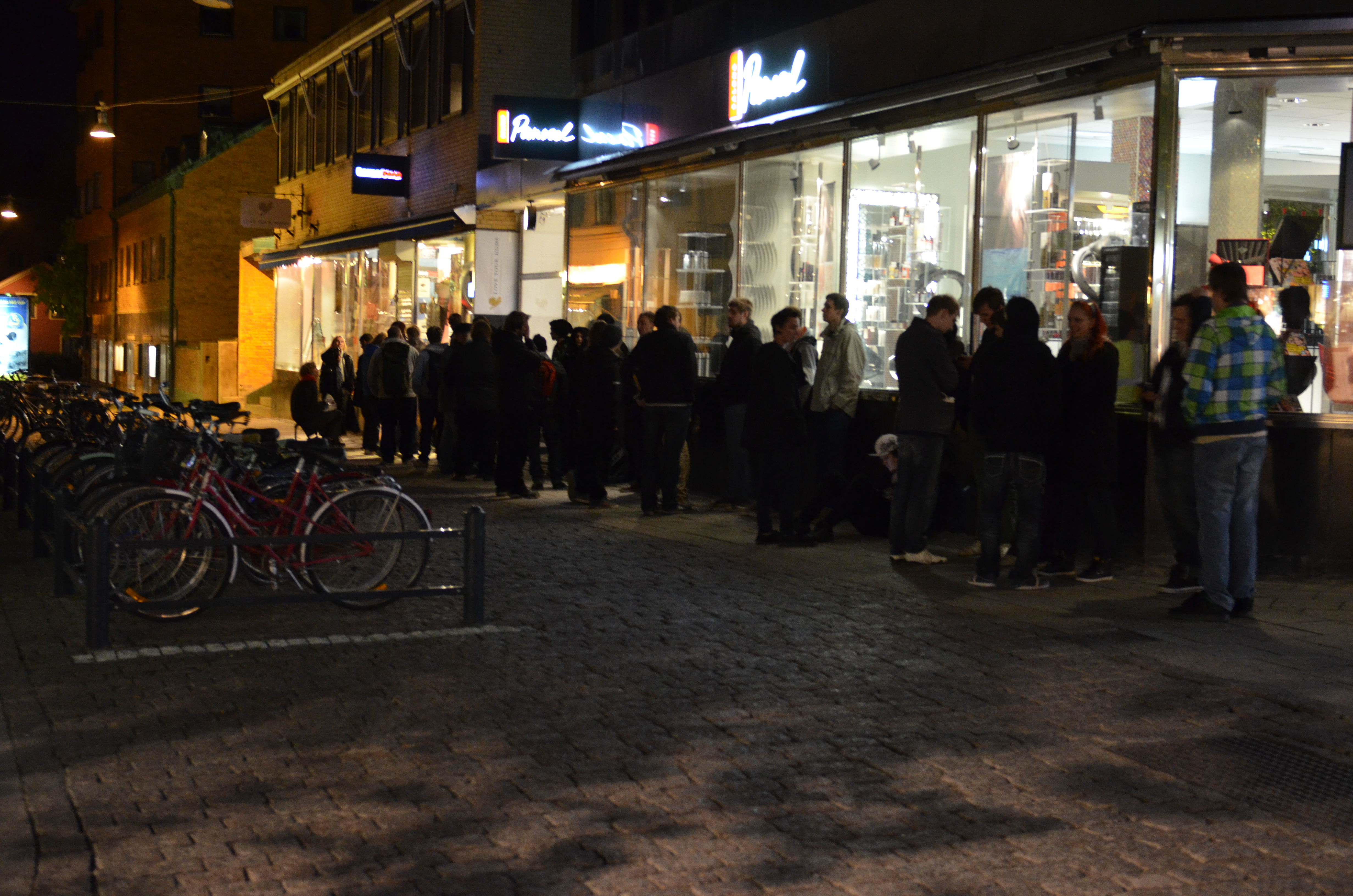 Kö till midnattssläppet för Diablo III 15 maj 2012, Uppsala.